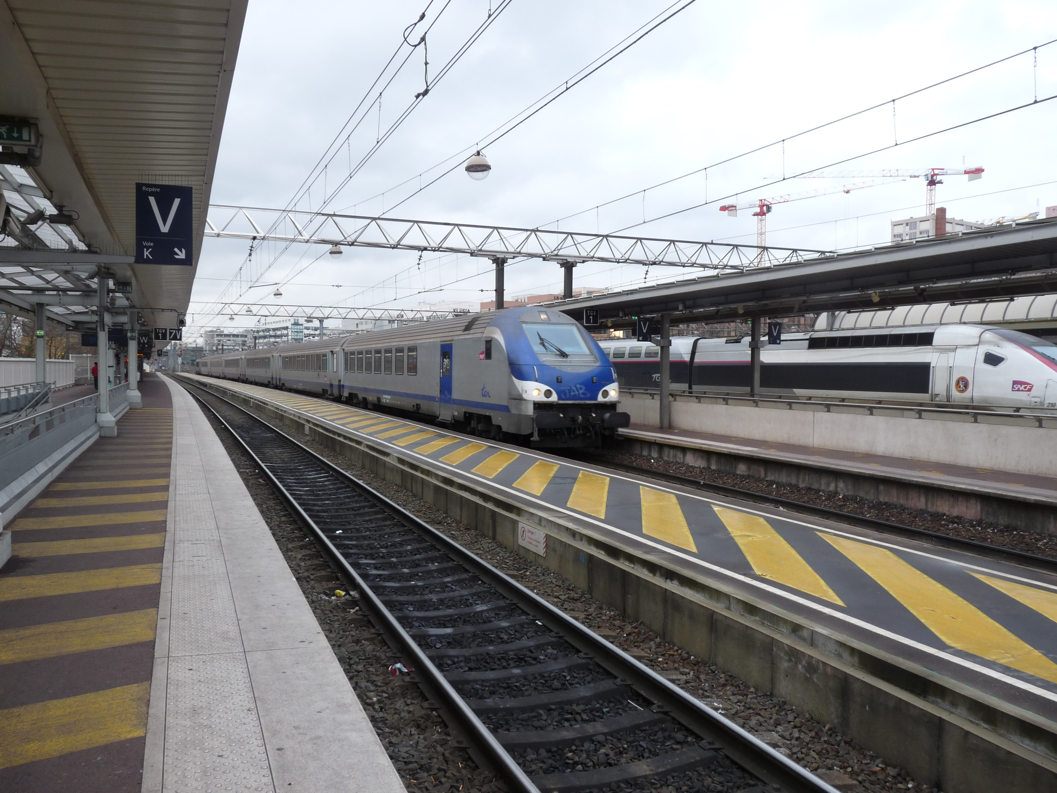 Lyon-Part-Dieu treinen